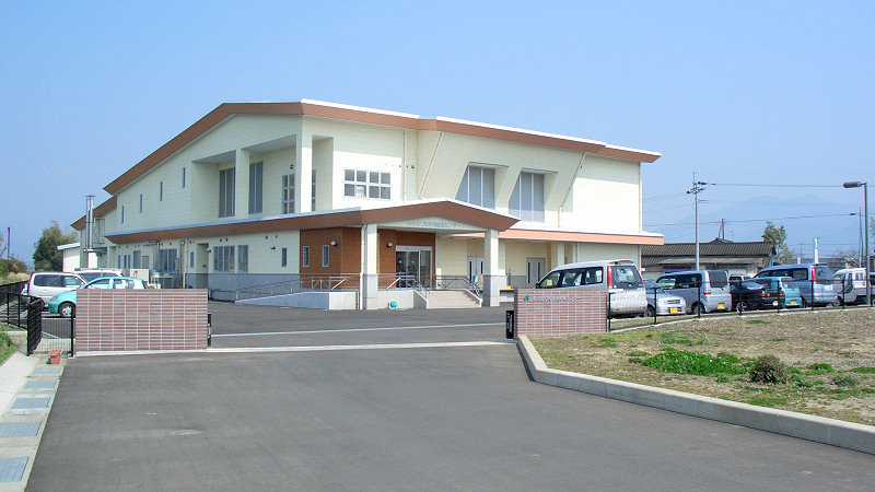 あさぎり町学校給食センター 外観 撮影者/著者/著作権保有者 : MK Products (本人がアップロード) 撮影日 : 2007/03/22 東免田駅用にアップロードした画像です。良い画像があれば別の画像に変えてください。